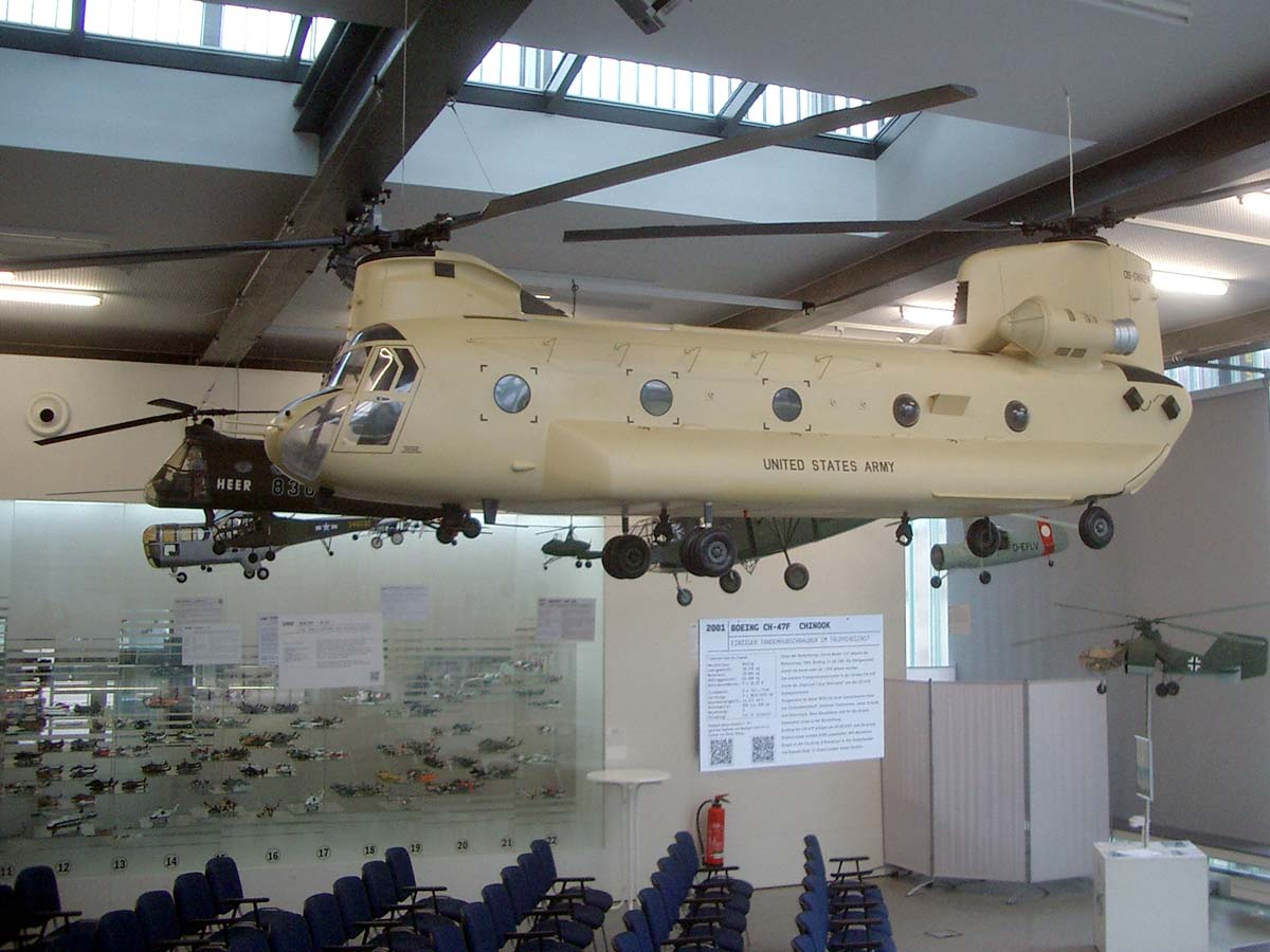 Grossmodell im Maßstab 1 : 9,3 des Hubschraubers Boeing-Vertol CH-47F CHINOOK im Hubschraubermuseum Bückeburg